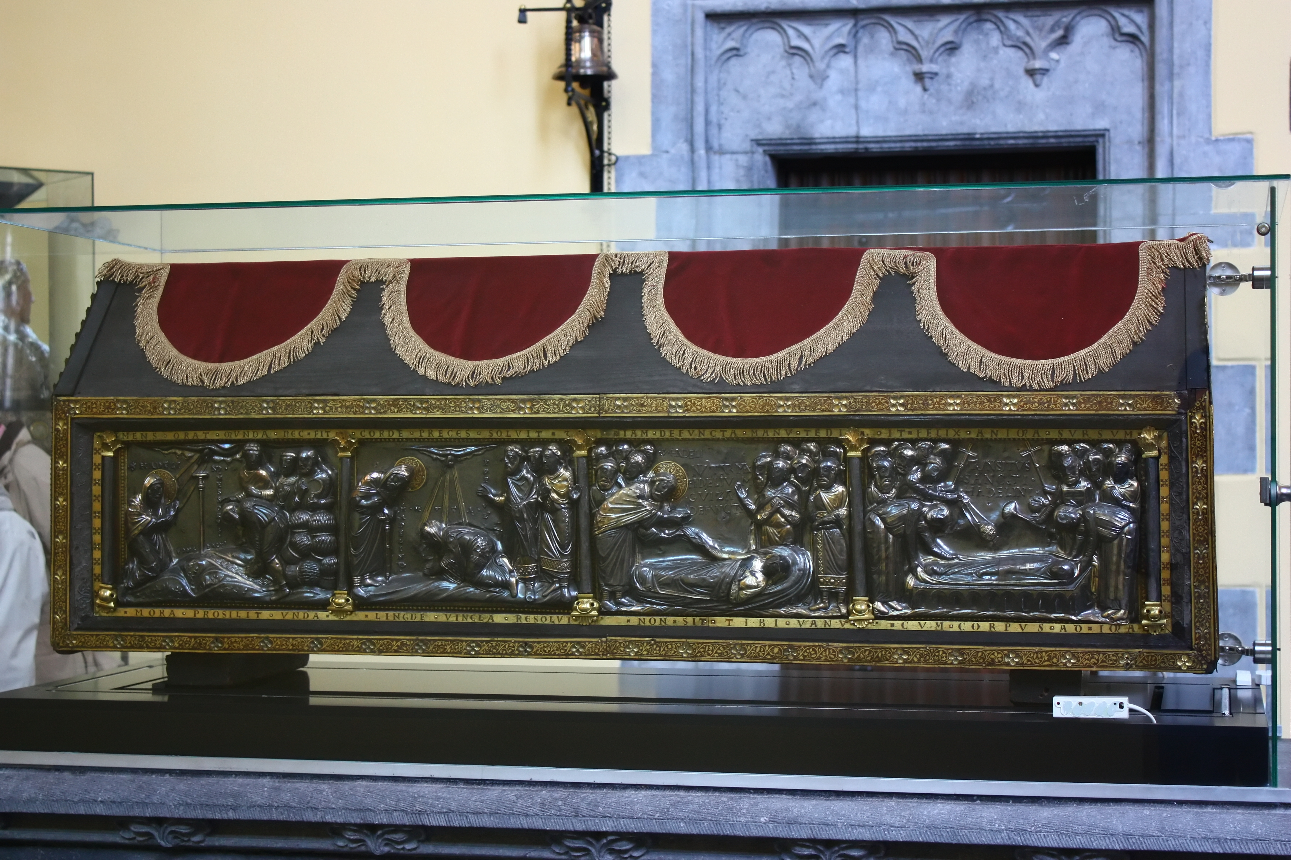 Châsse de Saint-Hadelin sise en l'église Saint-Martin de Visé, Belgique.